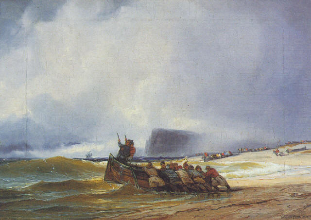 Heinrich Gätke, Helgoland, Öl auf Leinwand, 1838